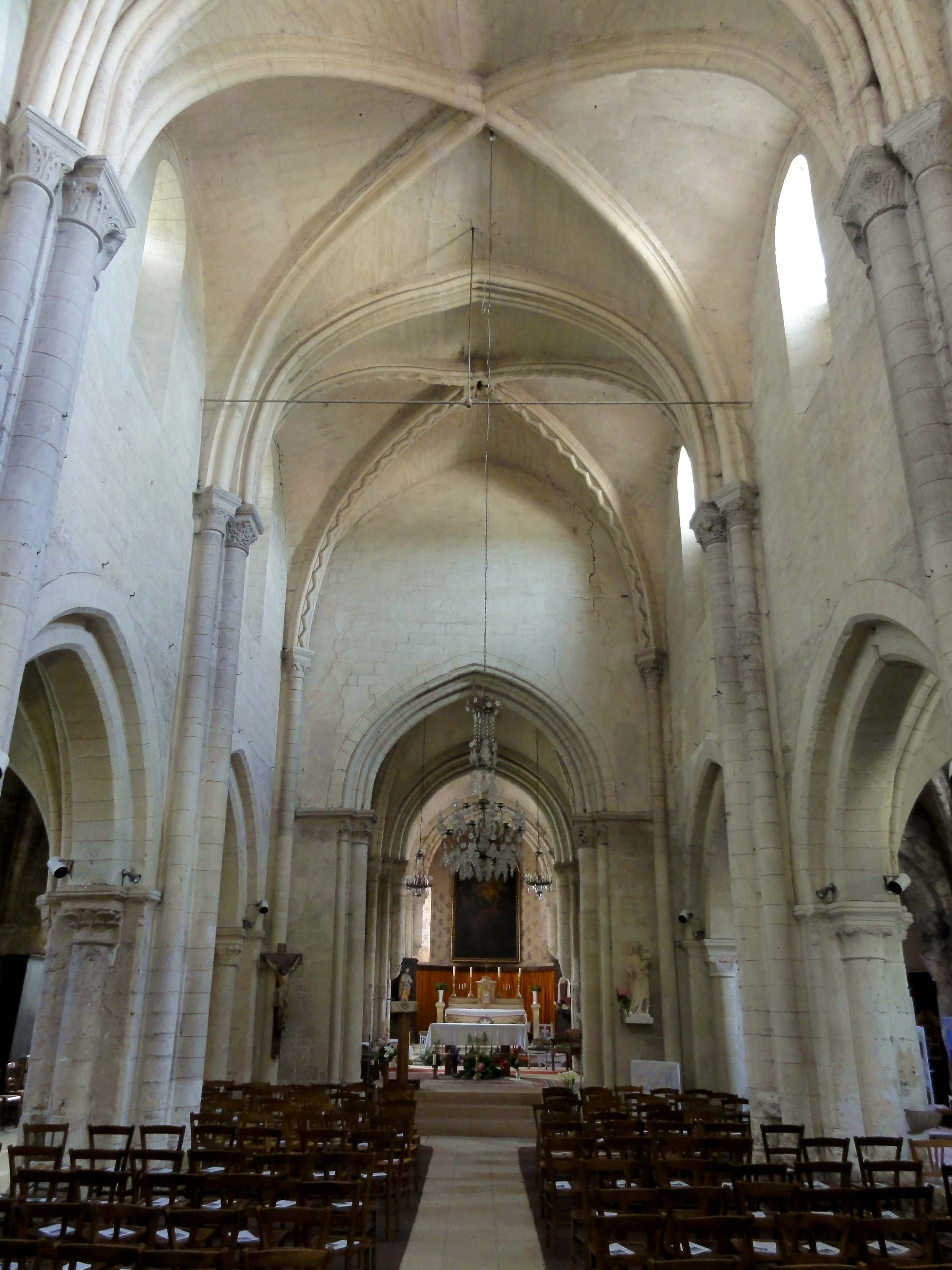 Intérieur de l'église Saint-Pierre-et-Saint-Paul (voir titre).